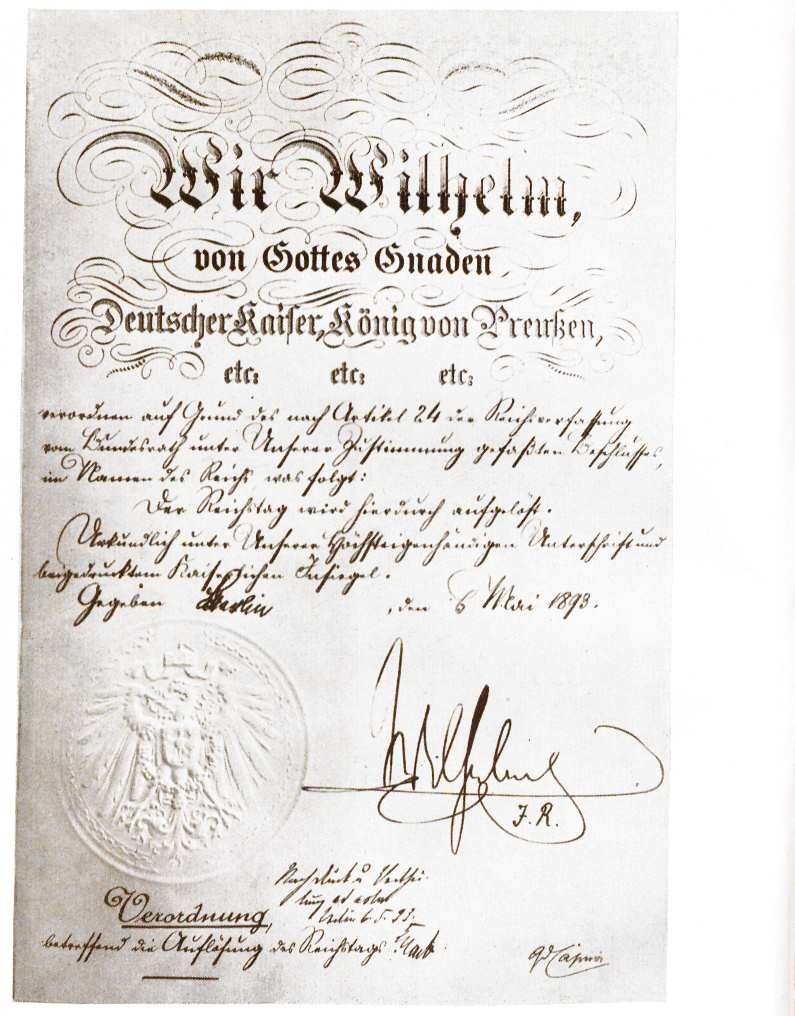 Wilhelm II. Reichstagsauflösung 1893.